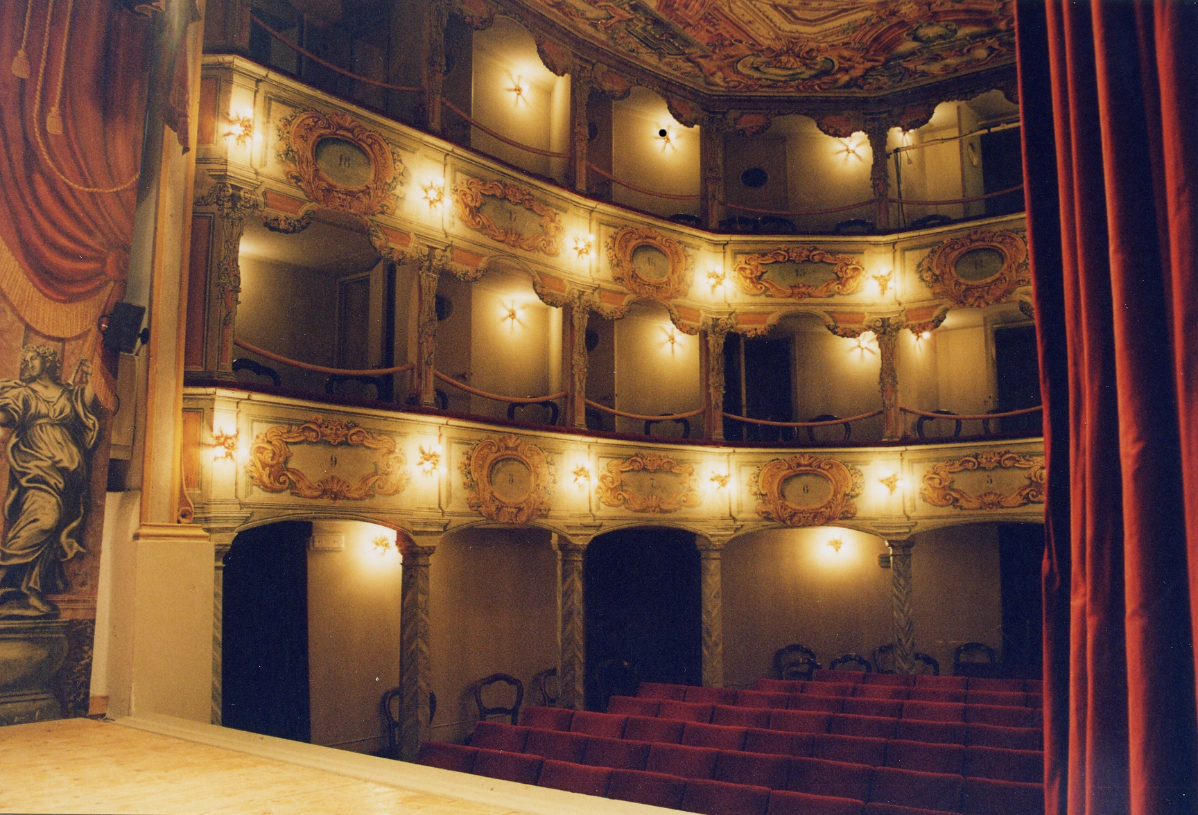 Vista dell'interno del Teatro Comunale di Penna San Giovanni (MC)